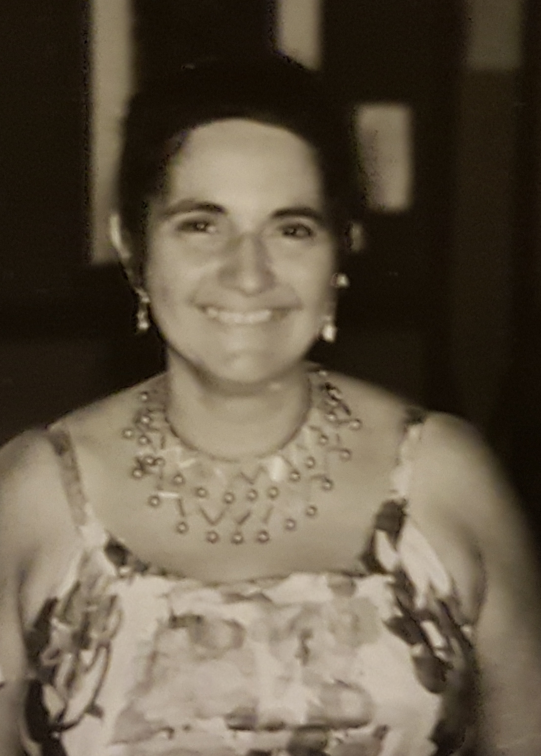 Foto perteneciente a la familia Passafari